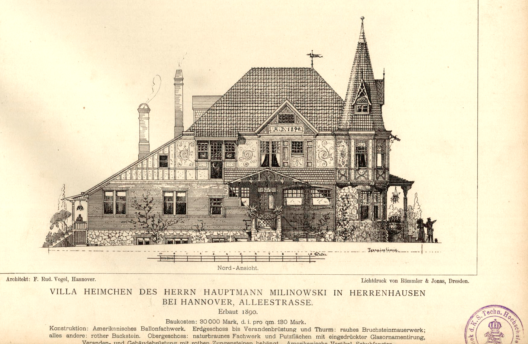 Blattausschnitt aus der Tafel 67 des Bildbandes „Einfache Villen und Landhäuser“ Architekturzeichnung mit einer Seitenansicht von Norden ("Nordansicht") der „Villa Heimchen des Herrn Hauptmann Milinowski in Herrenhausen bei Hannover, Alleestraße“ des Architekten F. Rudolf Vogel, hier vervielfältigt im Lichtdruck von Römler & Jonas mit Sitz in Dresden. Laut der Untertitelung betrugen die Baukosten für das 1890 erbaute Gebäude 30.000 Mark, und war insbesondere die „Konstruktion; Amerikanisches Ballonfachwerk“ Weiter heißt es: „Erdgeschoss bis Verandabrüstung und Thurm: rauhes Bruchsteinmauerwerk; alles andere: rother Backstein. Obergeschoss: naturbraunes Fachwerk und Putzflächen mit eingedrückter Glasornamentierung, Veranden- und Gebäudebrüstung mit rothen Zungensteinen behängt. Amerikanische Vertikal-Schubfenster.“ Rechts unten am Blattrand der Eigentums-Stempel der Bibliothek der Königlich Sächsischen Technischen Hochschule in Dresden.